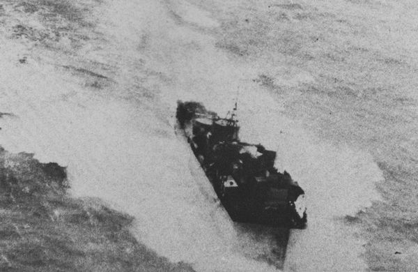 南シナ海で米陸軍航空隊機の爆撃を受ける天津風